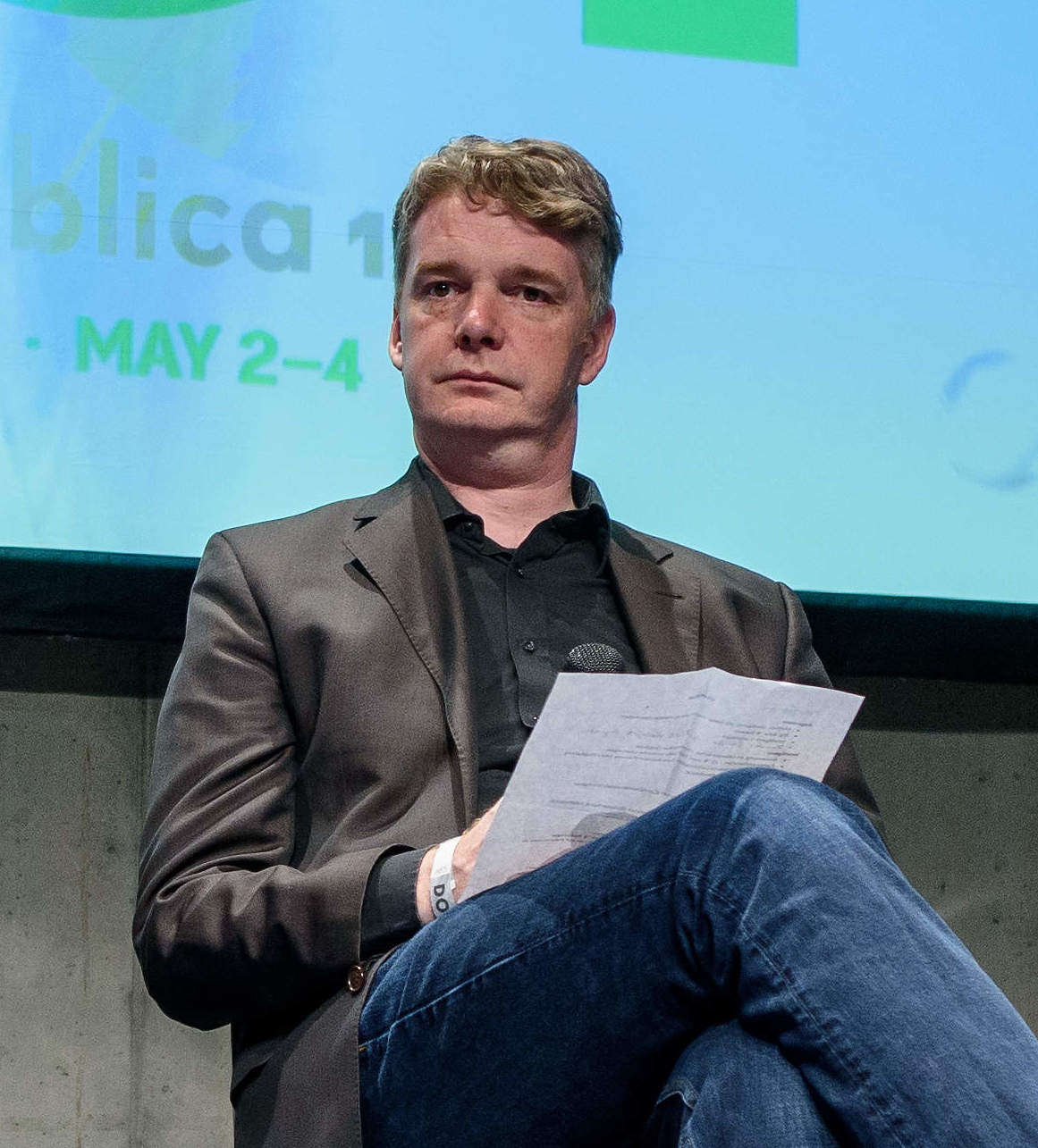 03.05.2018, Berlin: Talk: Künstliche Intelligenz, Algorithmen und die Arbeit von Morgen Speaker: Björn Böhning, John-Dylan Haynes, Kerstin Jürgens, Caterina Lobenstein Die re:publica ist eine der weltweit wichtigsten Konferenzen zu den Themen der digitalen Gesellschaft und findet in diesem Jahr vom 02. bis 04. Mai in der STATION-Berlin statt. Foto: Gregor Fischer/re:publica